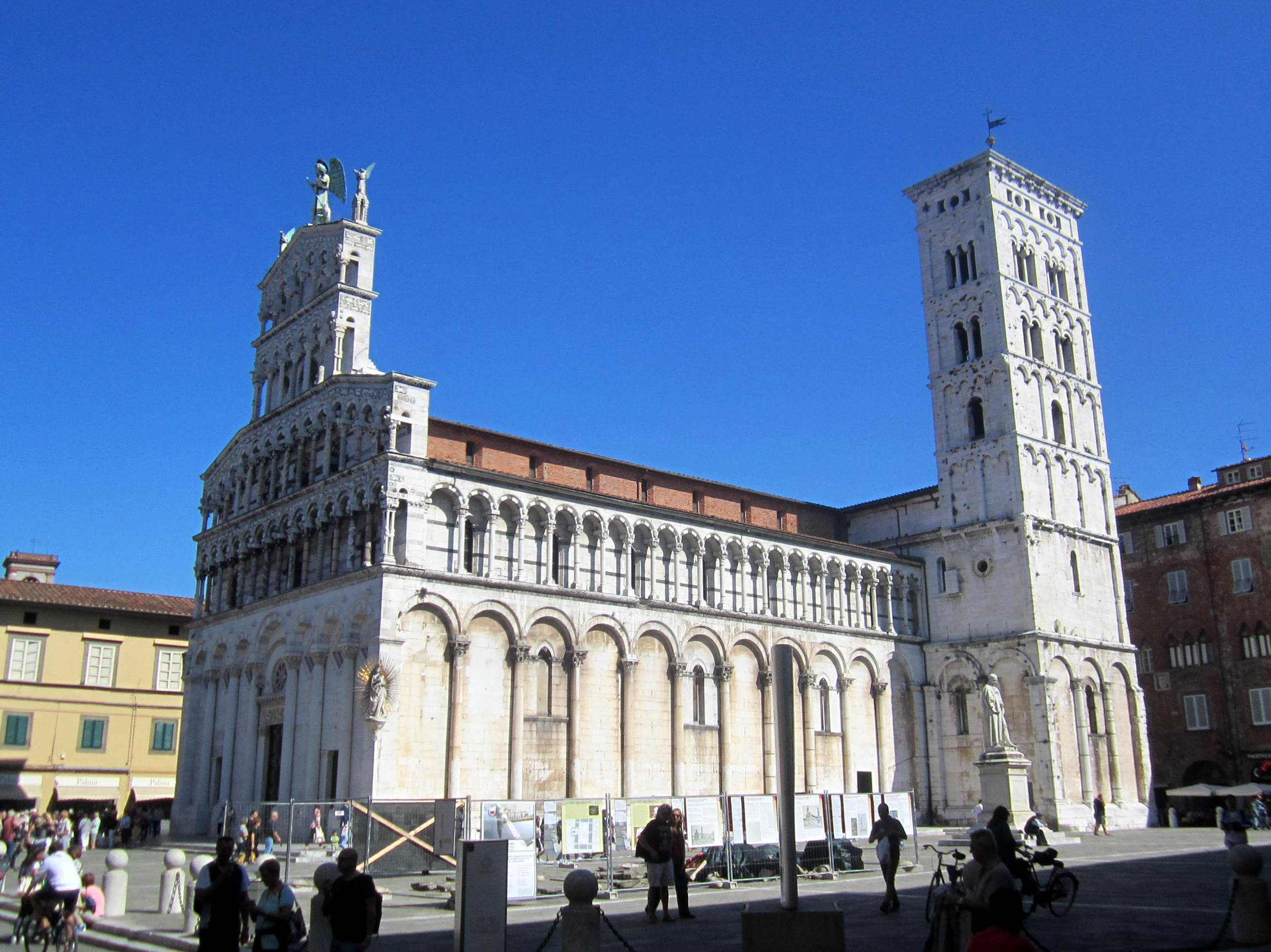 Chiesa di San Michele in Foro a Lucca